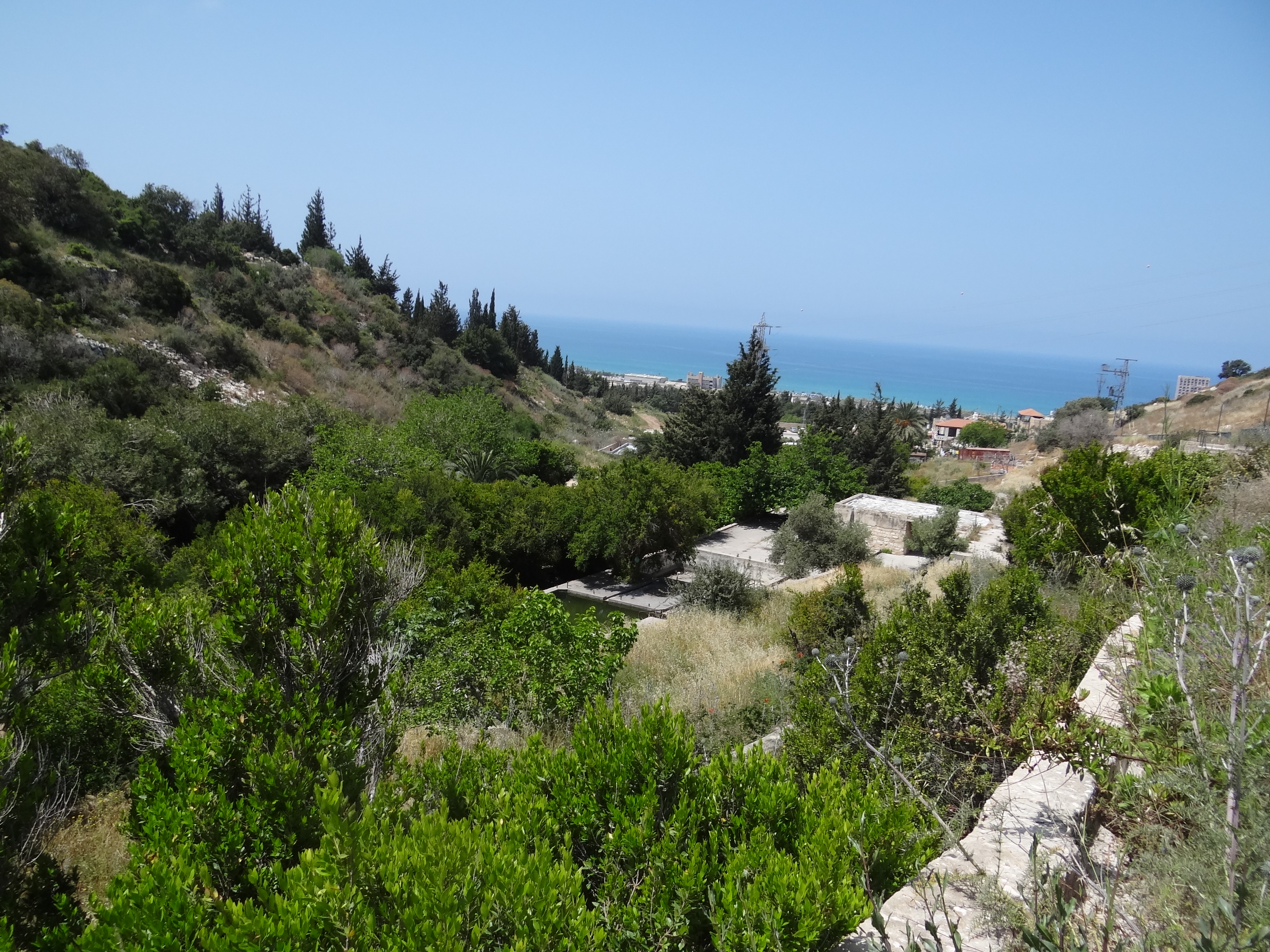 Wadi Siah, Haifa, Israel. נחל שִׂיחַ הוא נחל אכזב בצפון מערב הכרמל. ראשיתו בתוככי העיר חיפה ברחוב לוטוס שבשכונת כרמליה, והוא זורם מערבה לים התיכון. הנחל זורם בין שכונת כבאביר המשמשת כמרכז למוסלמים האחמדים בישראל ובין שכונת כרמליה. בנחל כנסיה כרמליתית מהמאה ה-13, שני מעיינות עין משוטטים ועין שיח, מערת קומתיים ששימשה את הכרמליתים, ובוסתן כיאט בוסתן כיאט